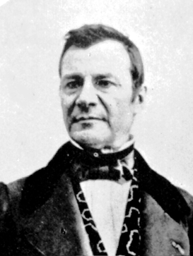 French entomologist Félix Édouard Guérin-Méneville (1799-1874)